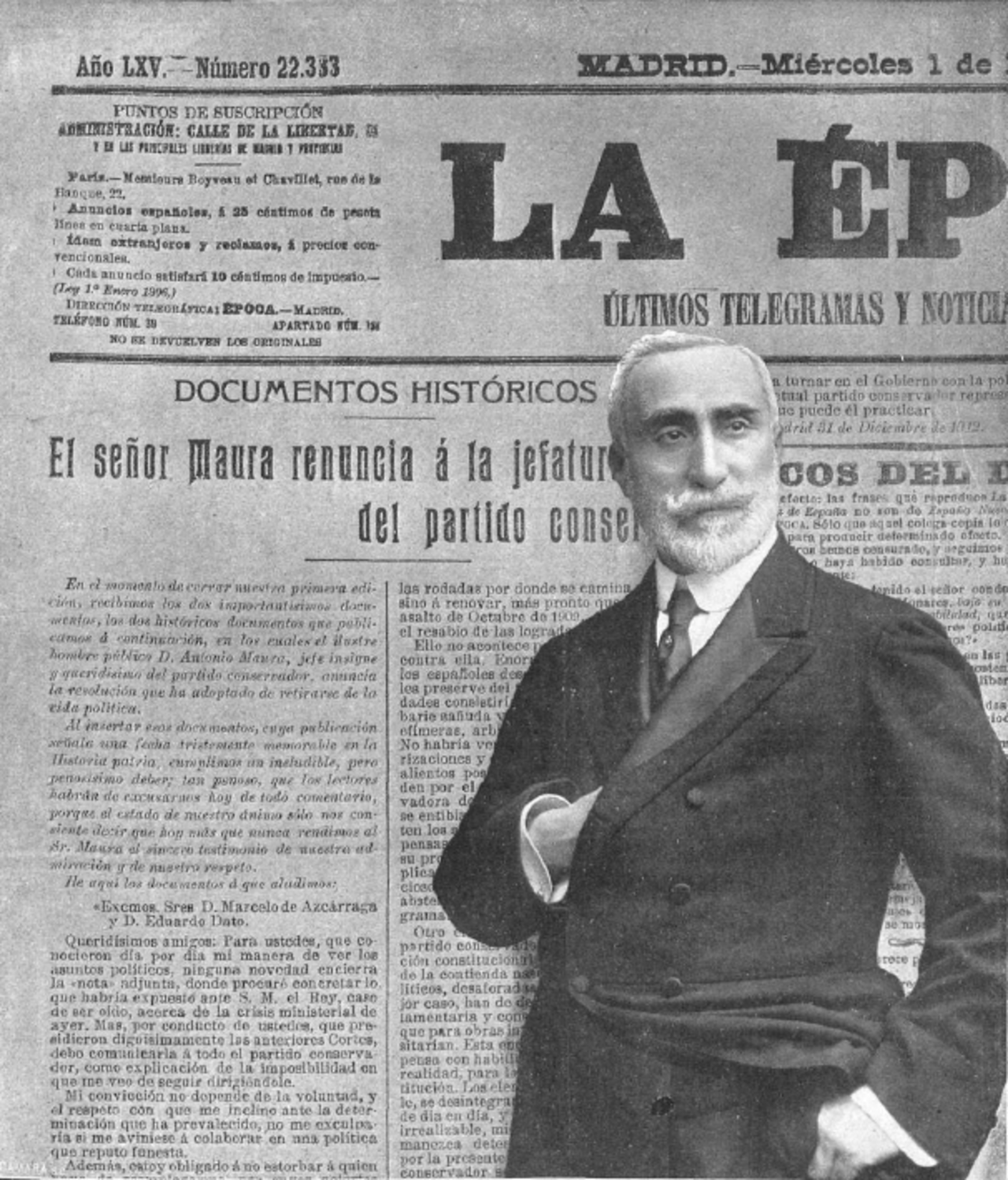 Composición fotográfica de Kaulak en la que se superpone la fotografía del político español Antonio Maura a la portada del periódico La Época en la que se anuncia su renuncia como líder del Partido Conservador